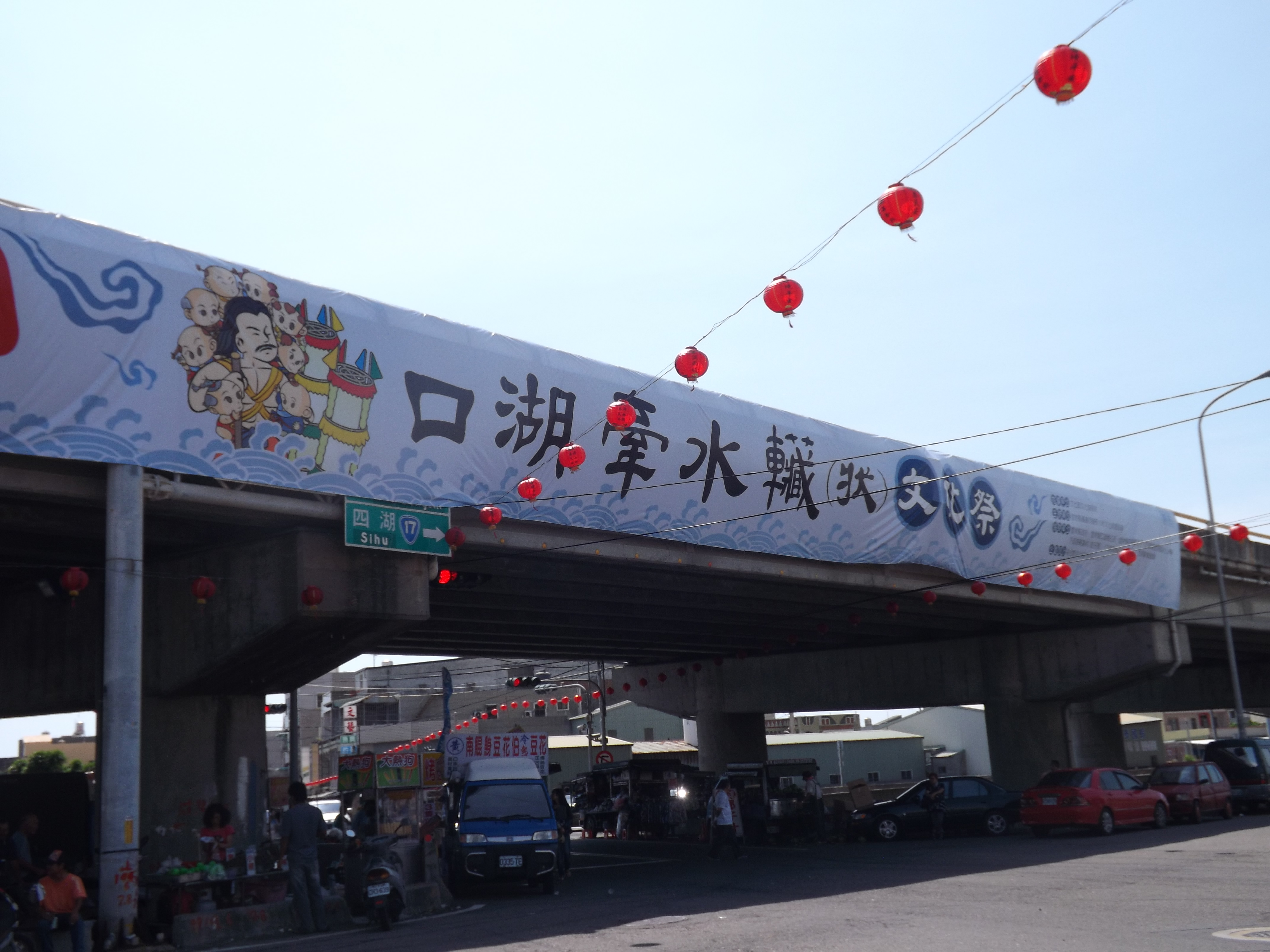 2014年，169周年口湖牽水藏文化季